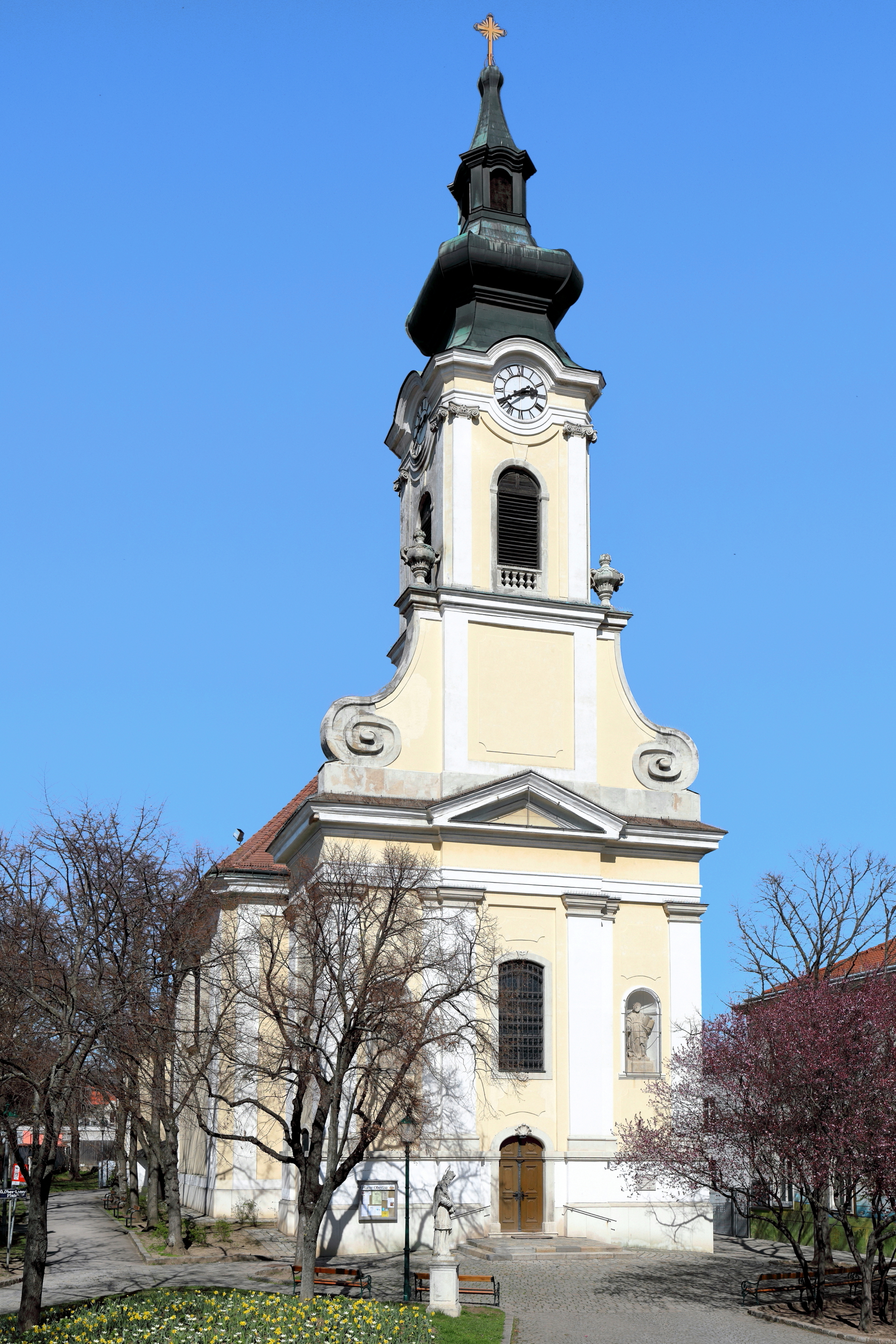 Südwestansicht der röm.-kath. Oberlaaer Pfarrkirche hl. Ägydius im 10. Wiener Bezirk Favoriten.Nachdem bei der Türkenbelagerung 1683 die Vorgängerkirche zerstört wurde, errichtete man nach Plänen von Hofbaumeister Matthias Gerl von 1744 bis 1746 eine neue barocke Kirche mit eintürmiger Fassade und Pilastergliederung.